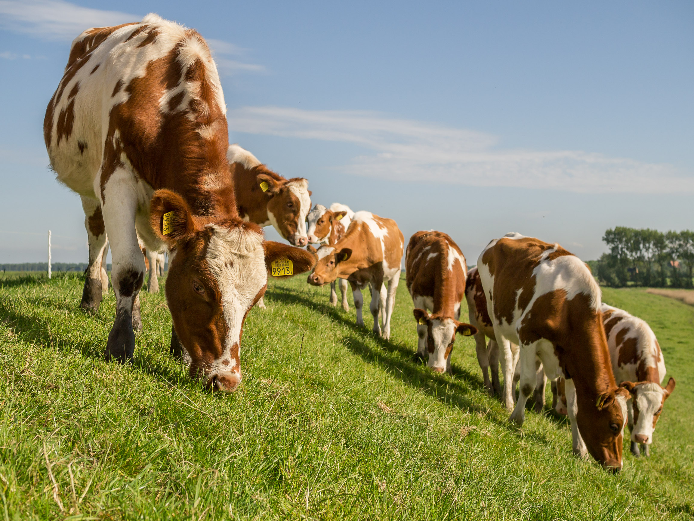 Koeien grazen op de oude lauwerzeedijk This is a photo or sound file made in Lauwersmeer National Park in the Netherlands, with the main subject of the file in the category: animals